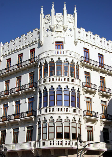 Casa Suay, Valencia, Spain.